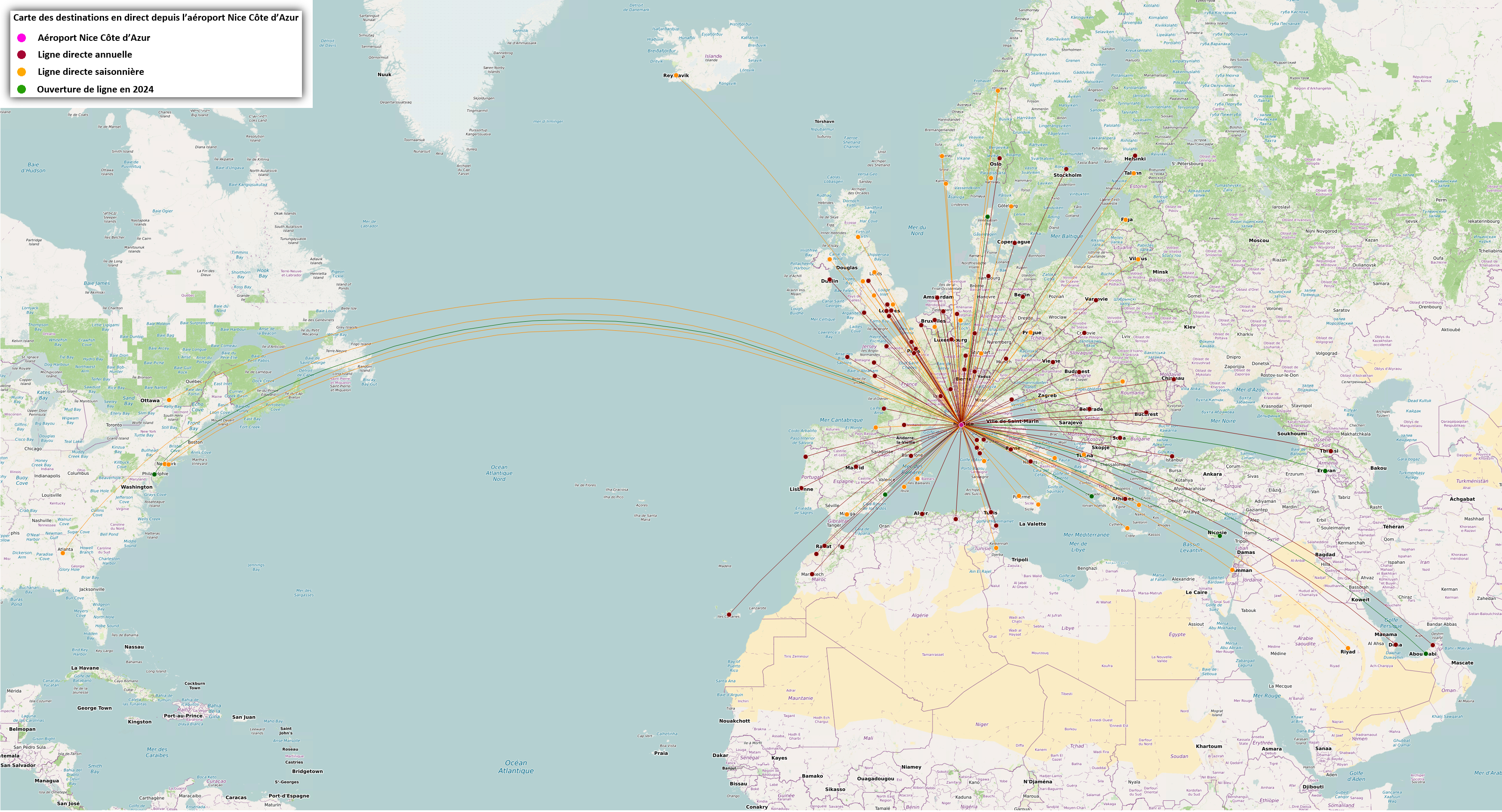 Carte des destinations et lignes directes depuis l'aéroport Nice Côte d'Azur.